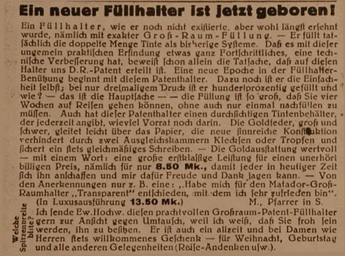 Zeitungsartikel zum Produkt Großraum-Füllhalter